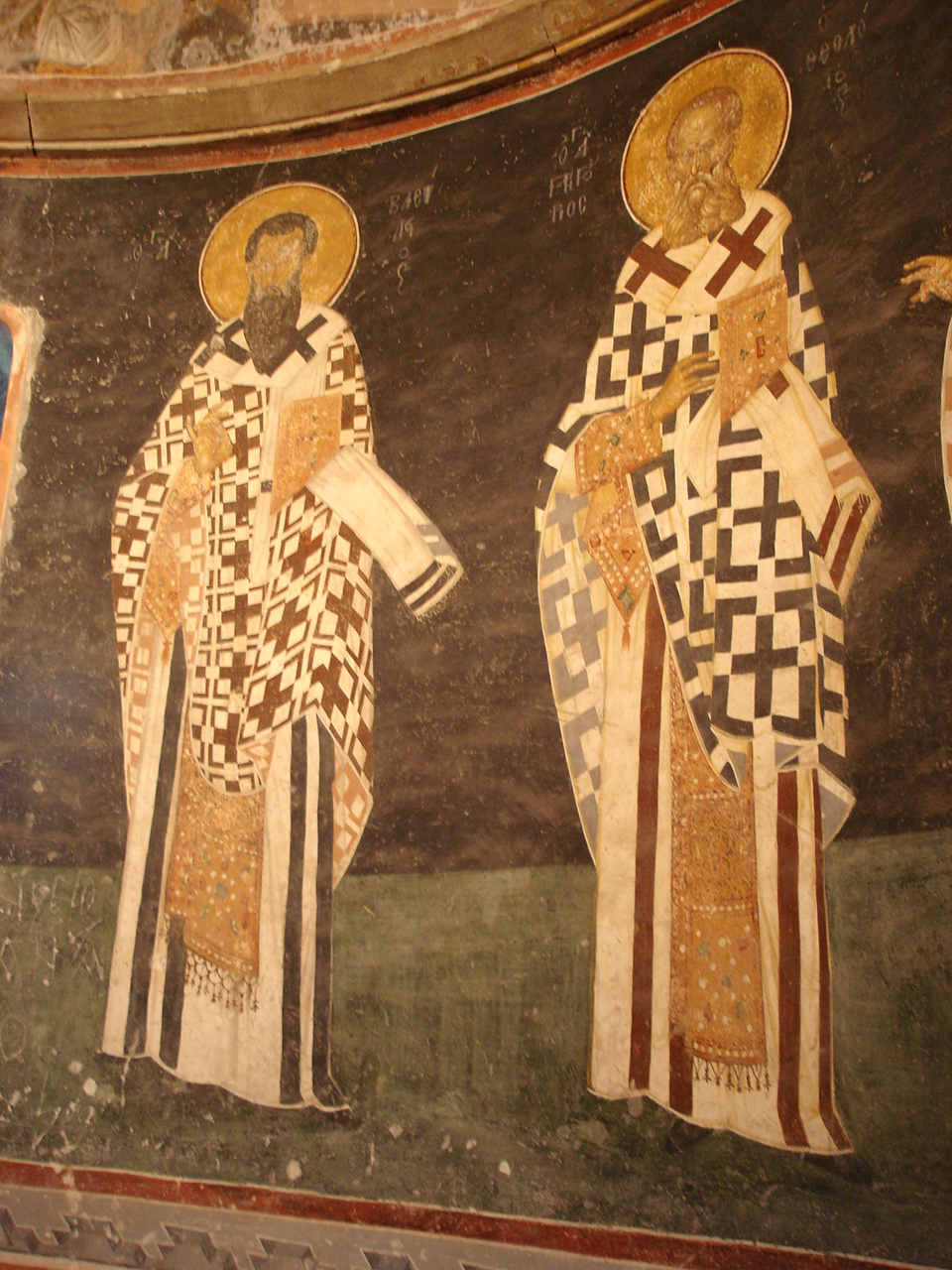 Istanbul: Museo di San Salvatore in Chora (Kariye Cami) - Parecclesion (cappella funeraria). Abside affrescato, dettaglio con i santi Babila e Gregorio. Foto di: Giovanni Dall'Orto, 29-5-2006.